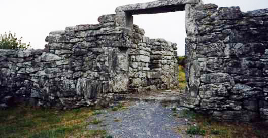 Cahermore